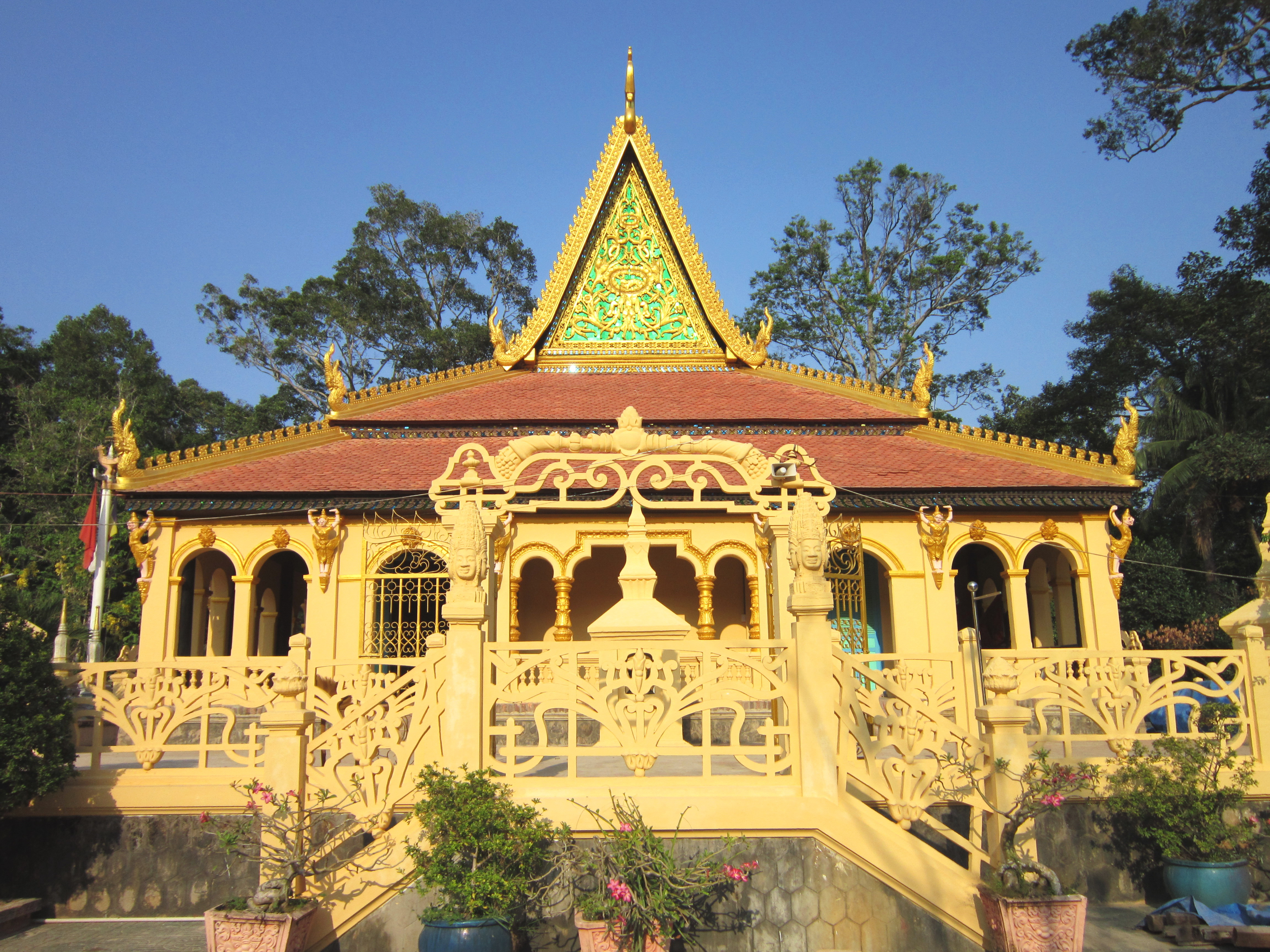 Chùa Âng (tên Khmer là Angkorajaborey) là một ngôi chùa cổ trong hệ thống chùa Khmer của tỉnh Trà Vinh, Việt Nam..